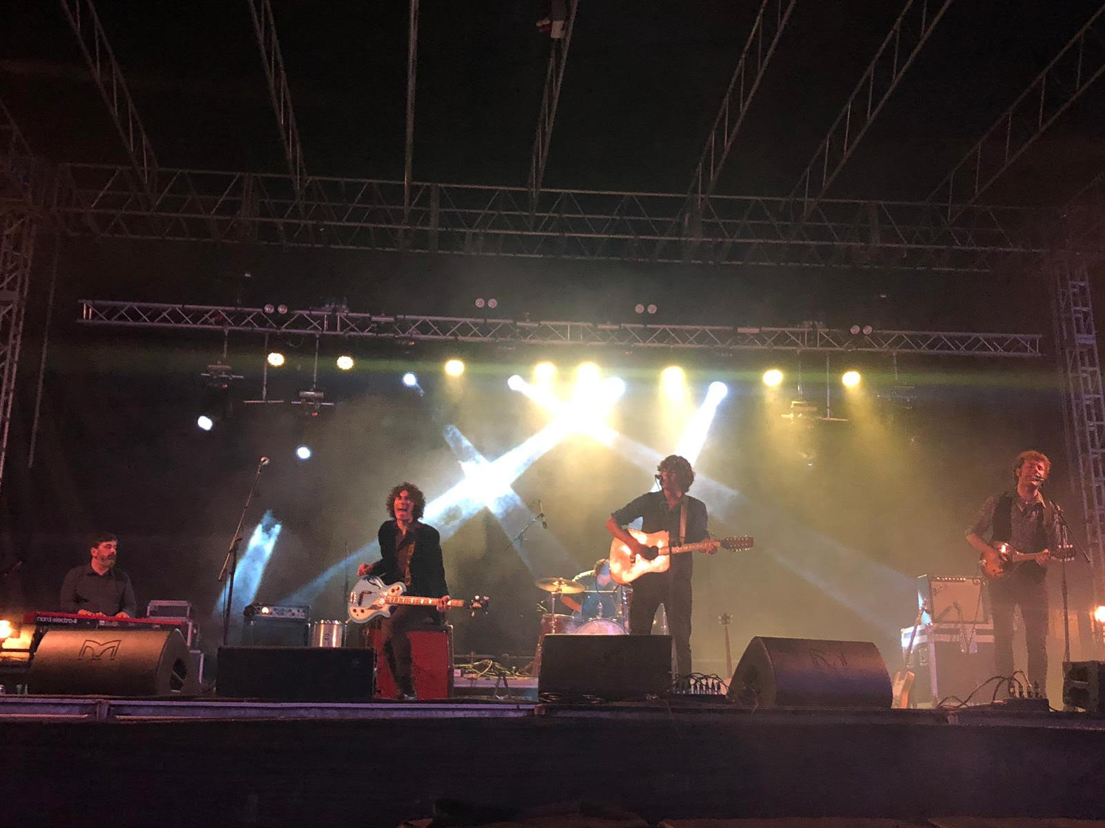 Concerto nas Festas do Cristo de Cangas en 2019